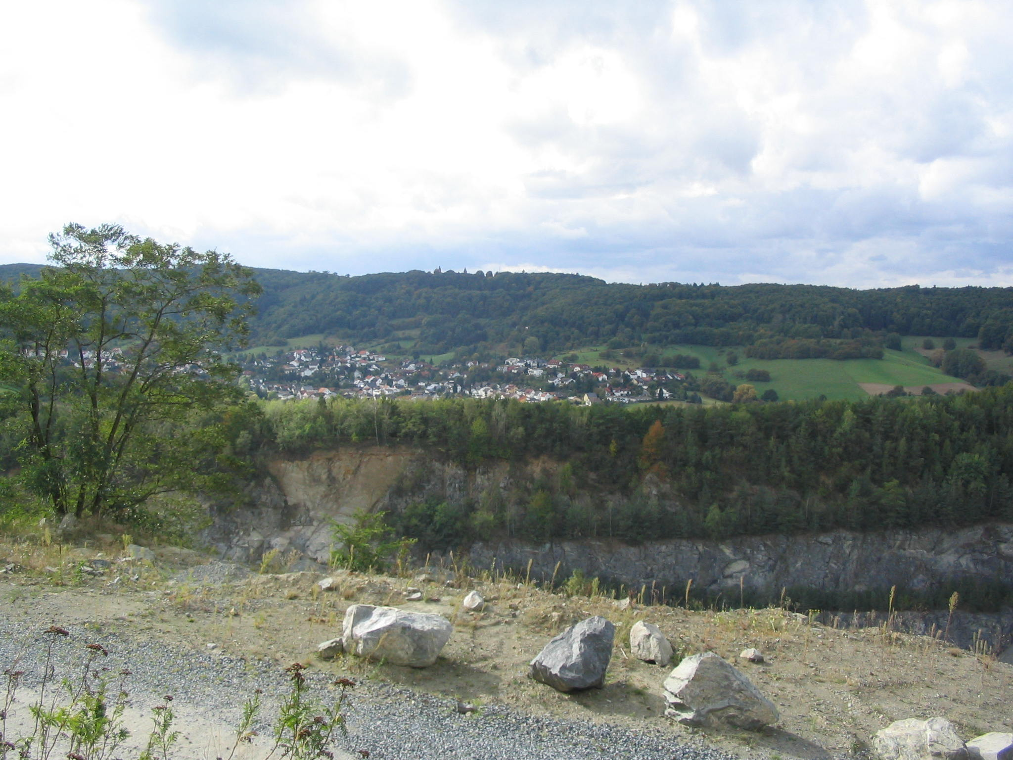 Langenberg mit Frankenstein vom Gabbro-Steinbruch am Glasberg aus, davor Nieder-Beerbach